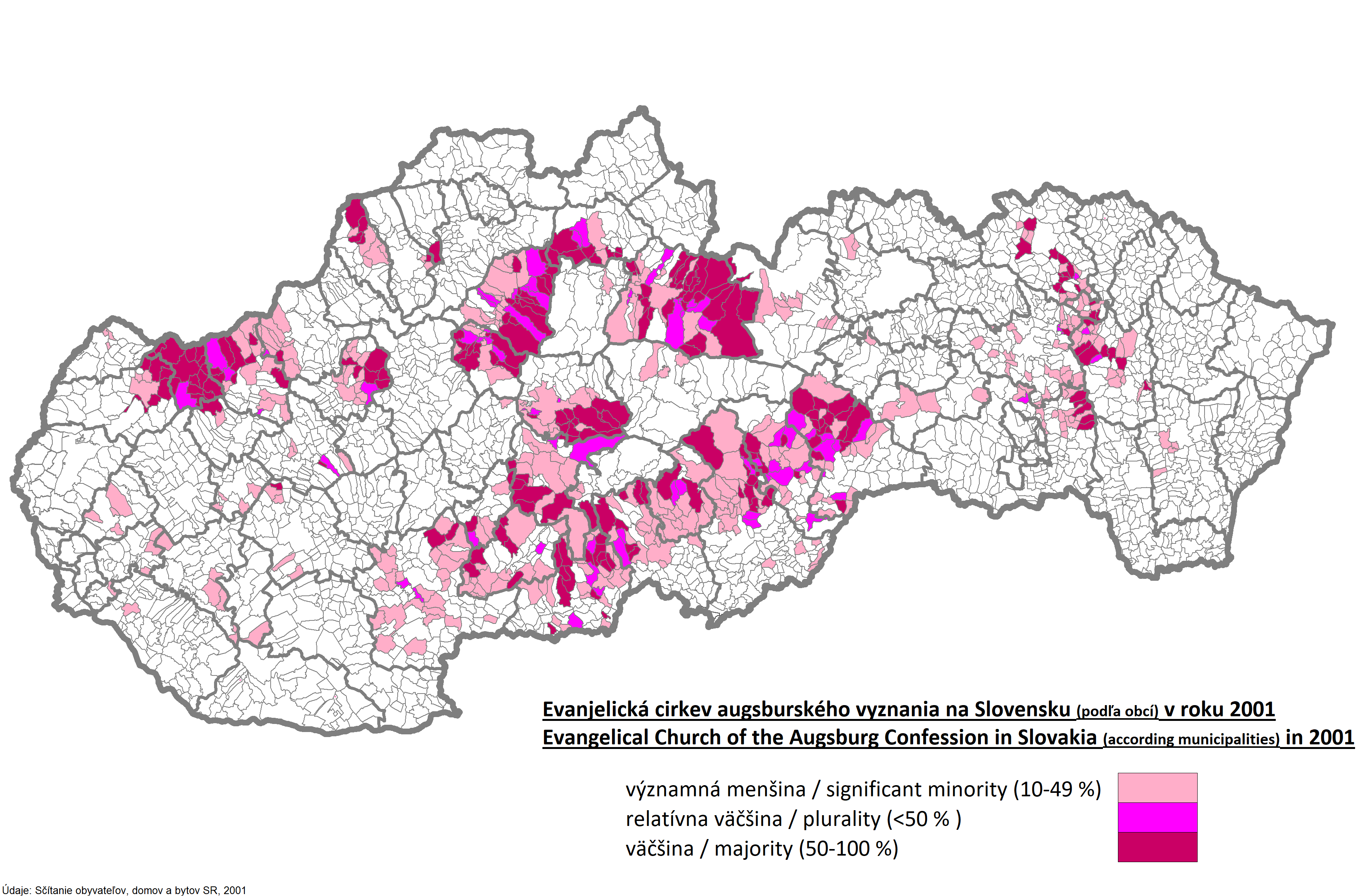 Evanjelicka cirkev SR 2001